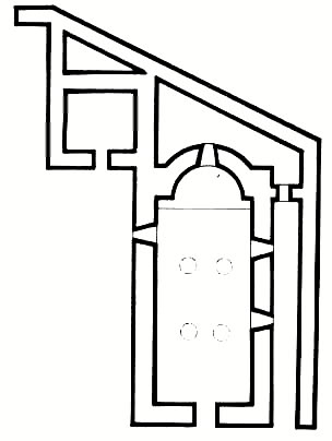 Mingəçevir Kilsə kompleksində iki nömrəli məbədin planı